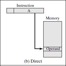 Adresimi Direkt